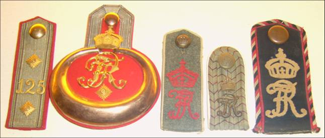 Dienstgradabzeichen des Infanterie-Regiments Kaiser Friedrich, König von Preußen (7. württembergisches) Nr. 125. Von links: Hauptmann Feldachselstück vor 1866, Oberleutnant, Musketier, Leutnant, Einjährig Freiwilliger.